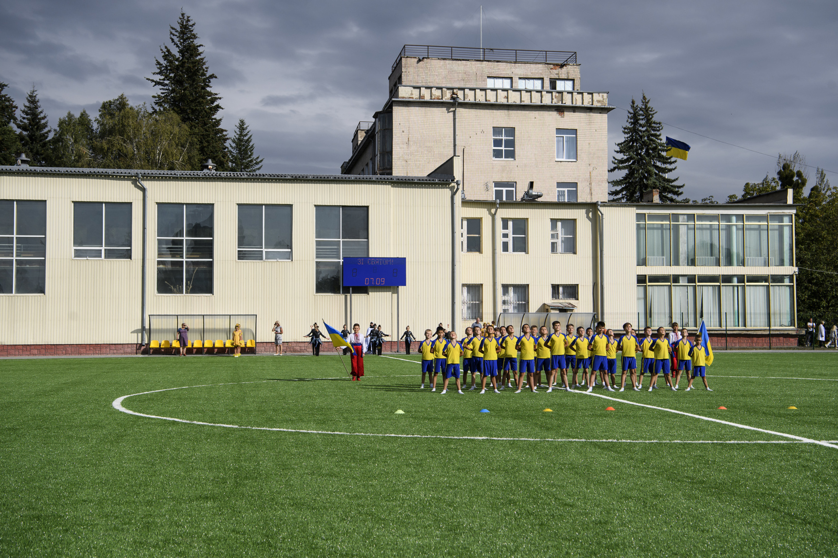 Вінницький міський палац дітей та юнацтва. Глава Уряду в рамках поїздки до Вінниці оглянув проект реконструкції Київського мосту і взяв участь у відкритті стадіону Вінницького міського палацу для дітей та юнацтва ім. Л. Ратушної